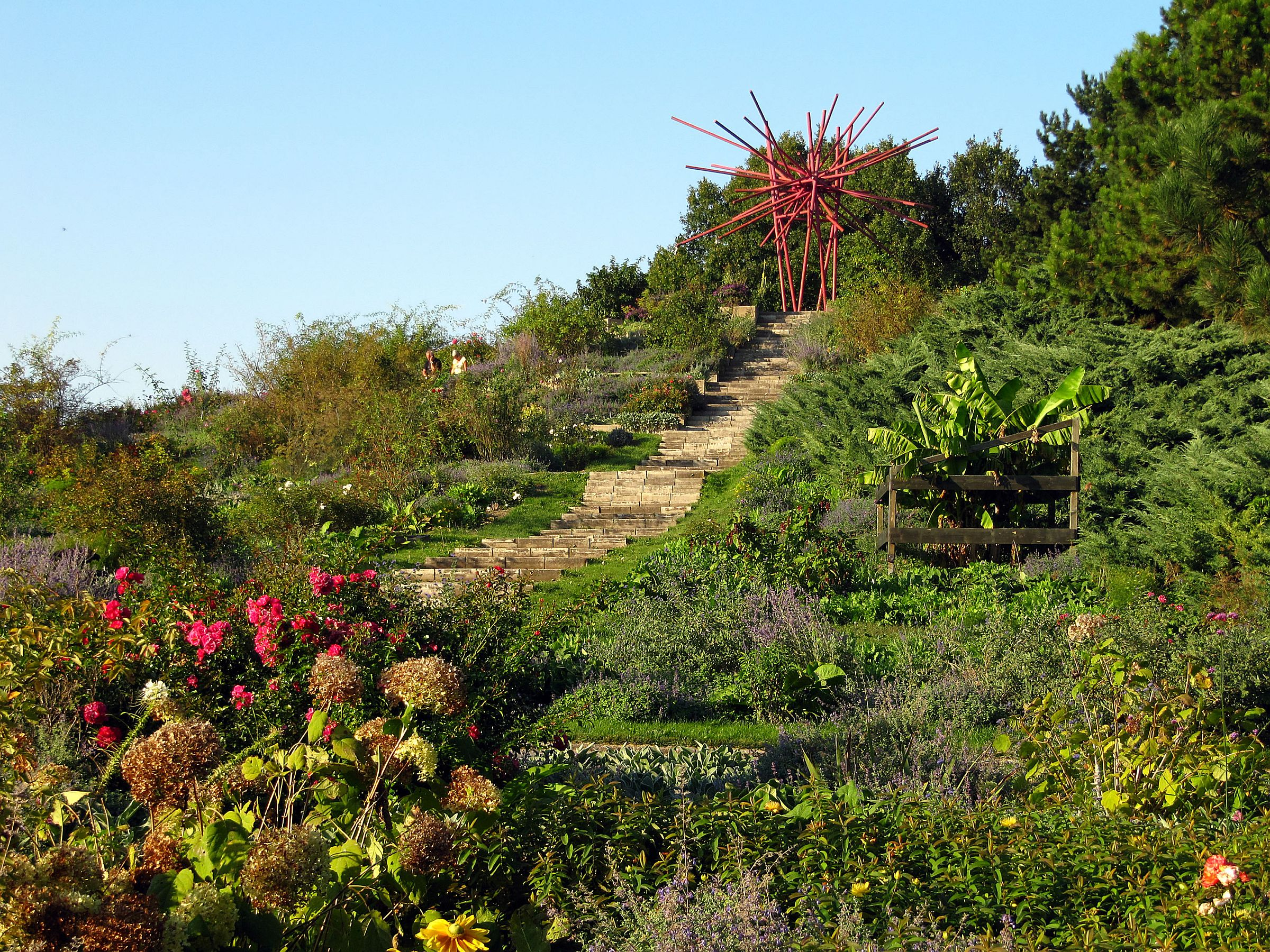 Kurpark Oberlaa Gartenbaudenkmale, Wegsysteme und künstliche Bodenformationen